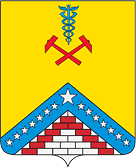 Герб Гулькевичского района